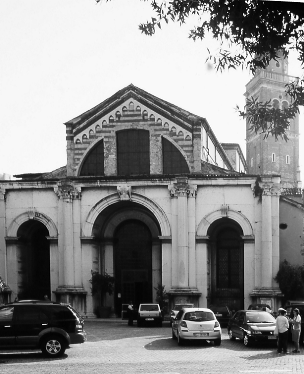 Santa Maria in Organo, facade